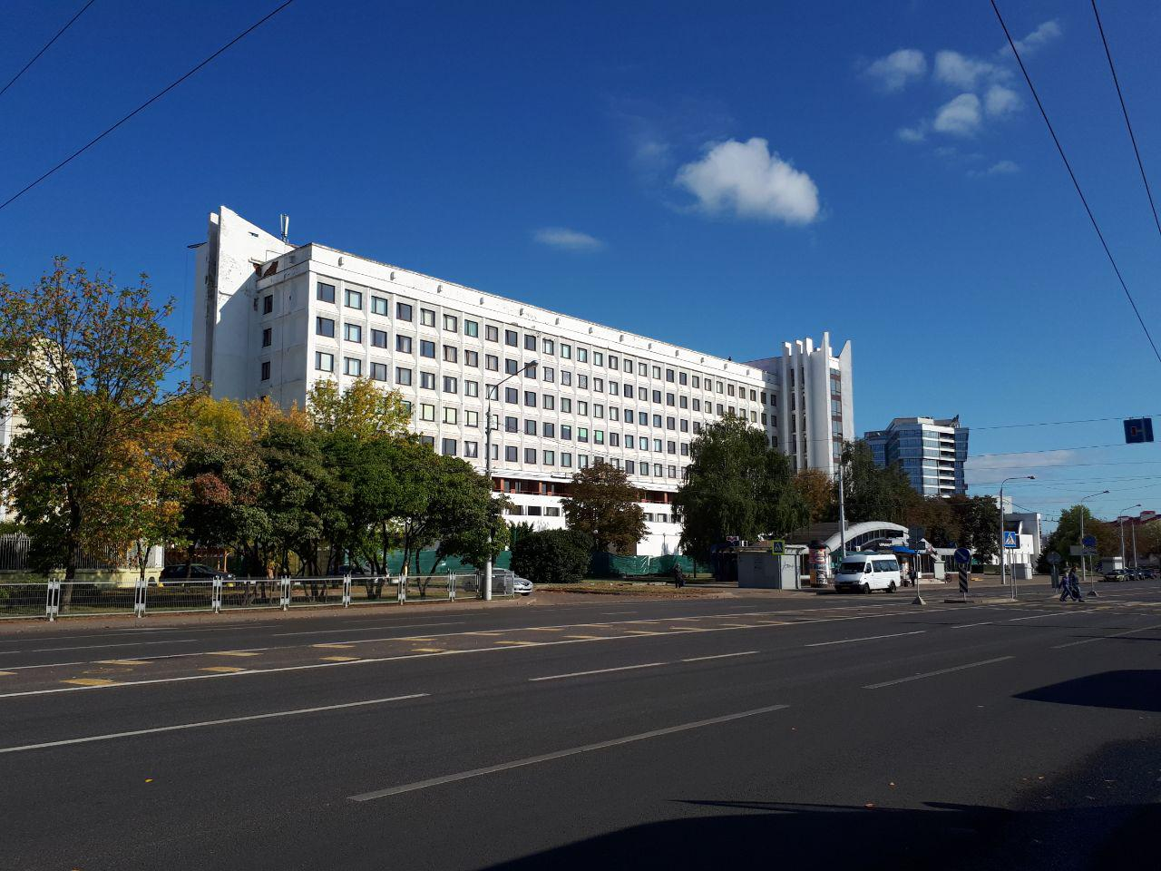 Белорусский государственный университет культуры и искусств в Минске